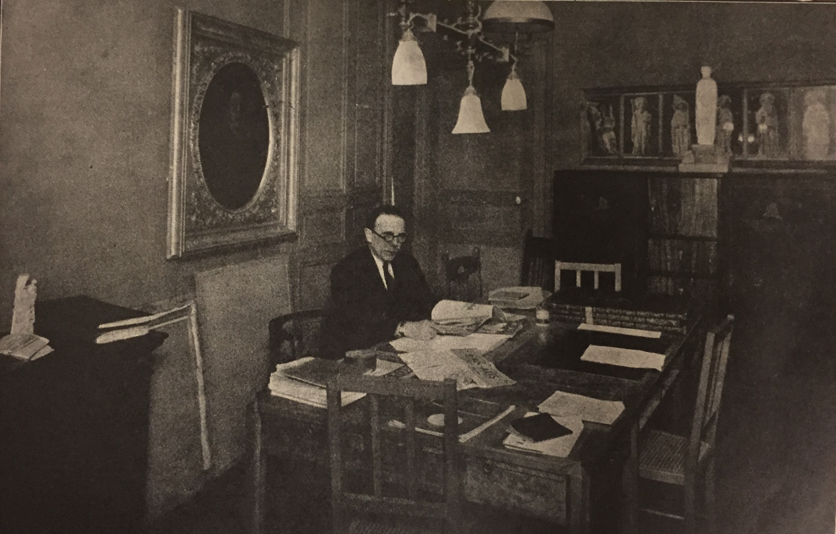 Portrait d'Henry Parayre